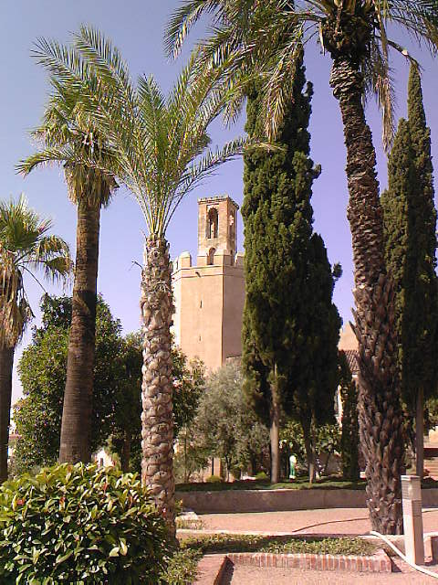 Torre albarrana octogonal que se encuentra en la alcazaza de Badajoz